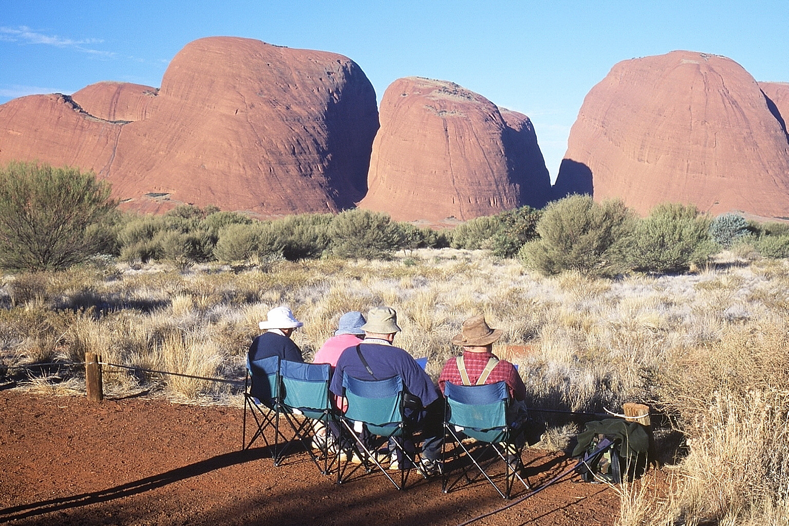 Les Olgas, Australie